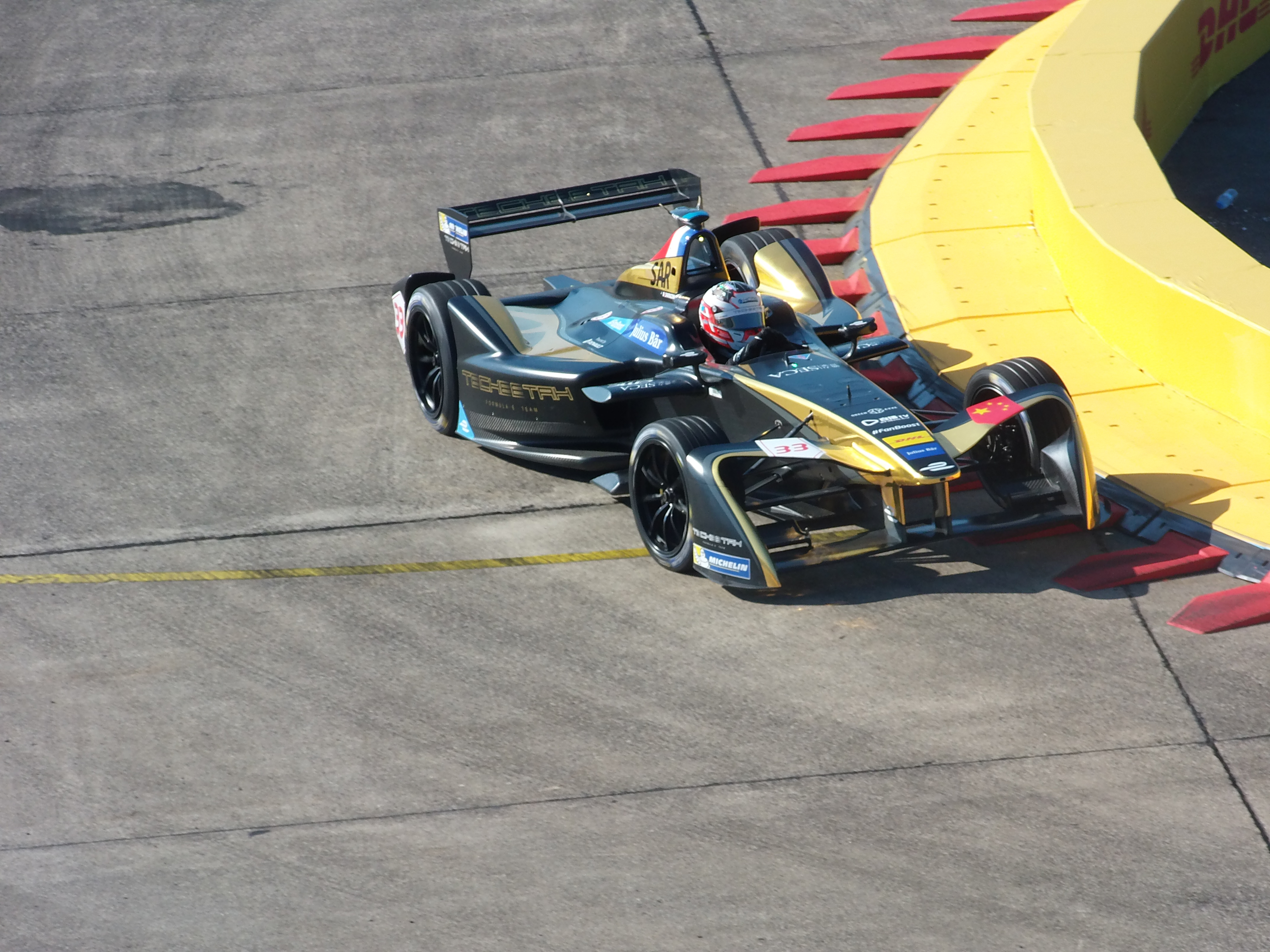 Stéphane Sarrazin (Techeetah) beim Berlin ePrix 2017